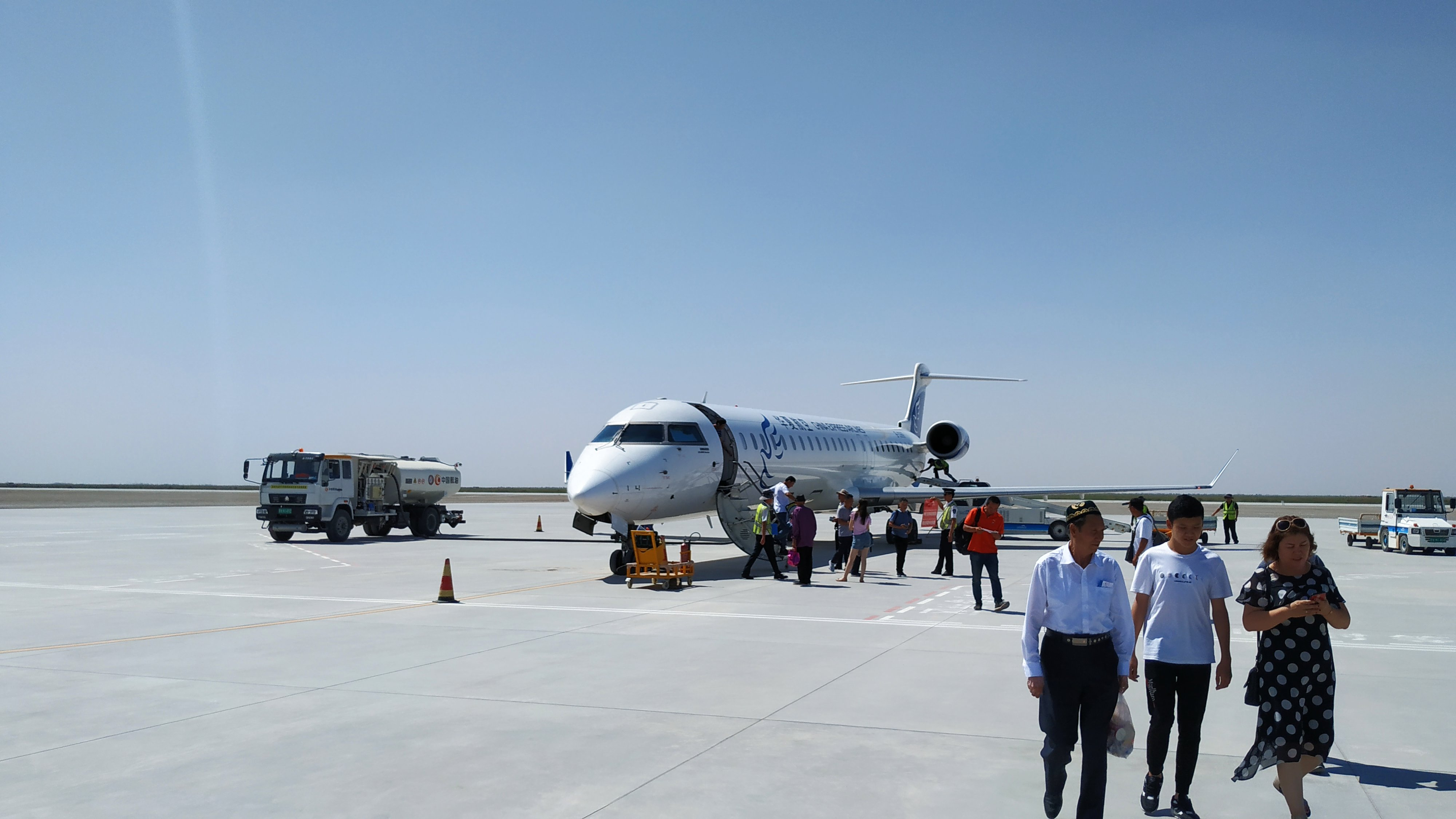 中文（中国大陆）: 华夏航空庞巴迪CRJ-900 B-3369在且末玉都机场